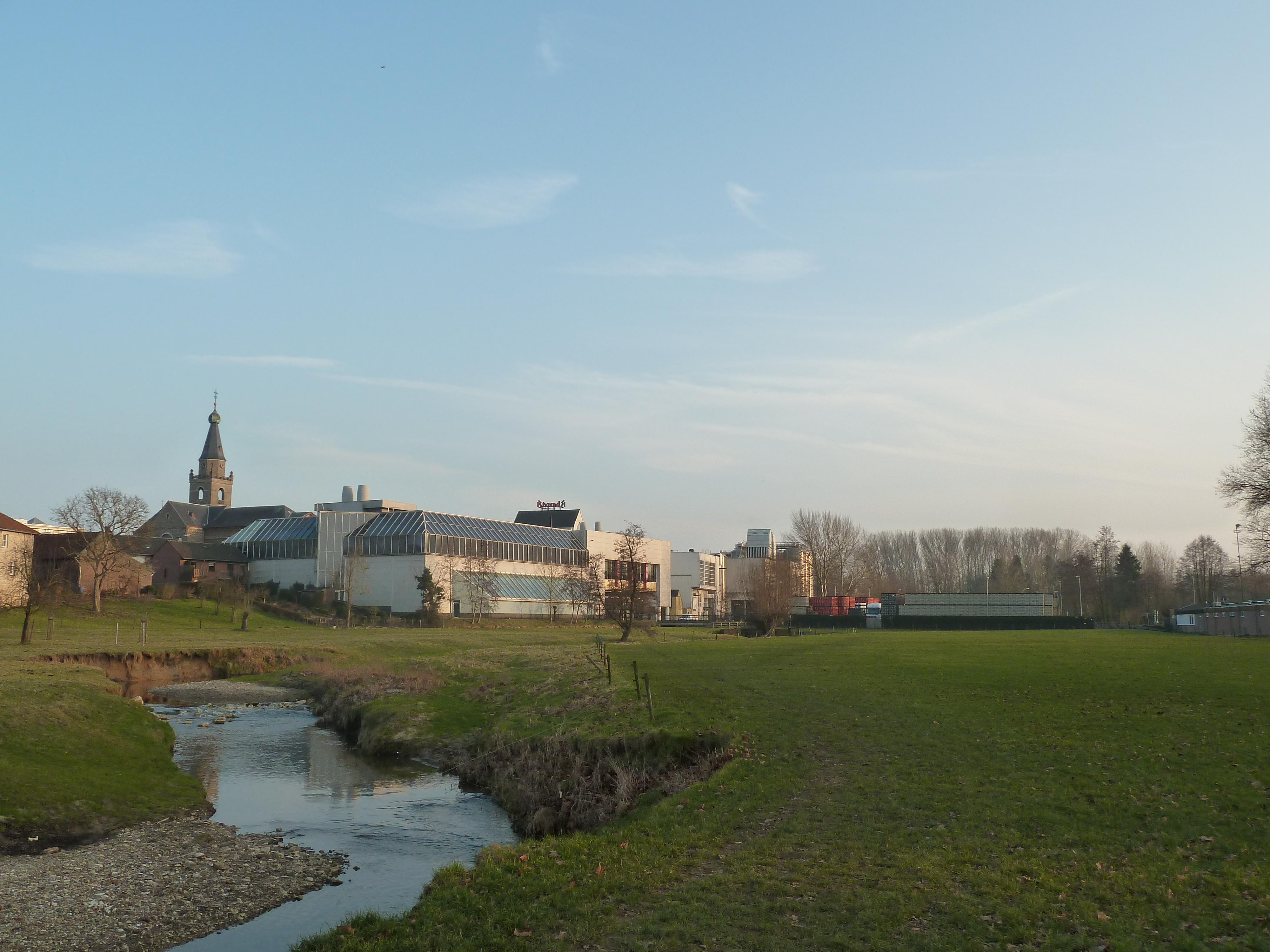 Brand Bierbrouwerij, Wijlre, Gulpen-Wittem, Limburg, Nederland